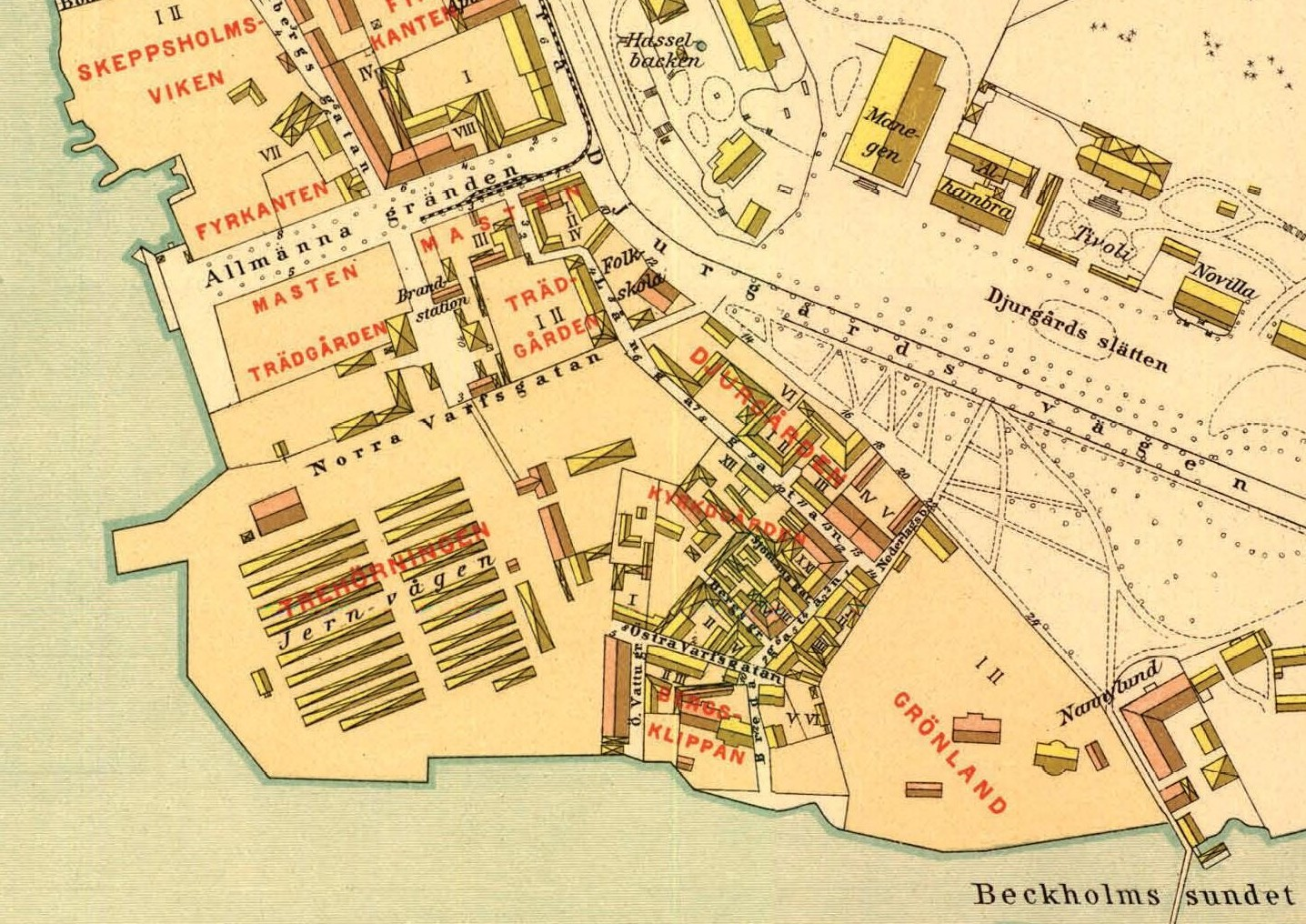 Lundgrens karta över Stockholm från 1885, del av Södra Djurgården